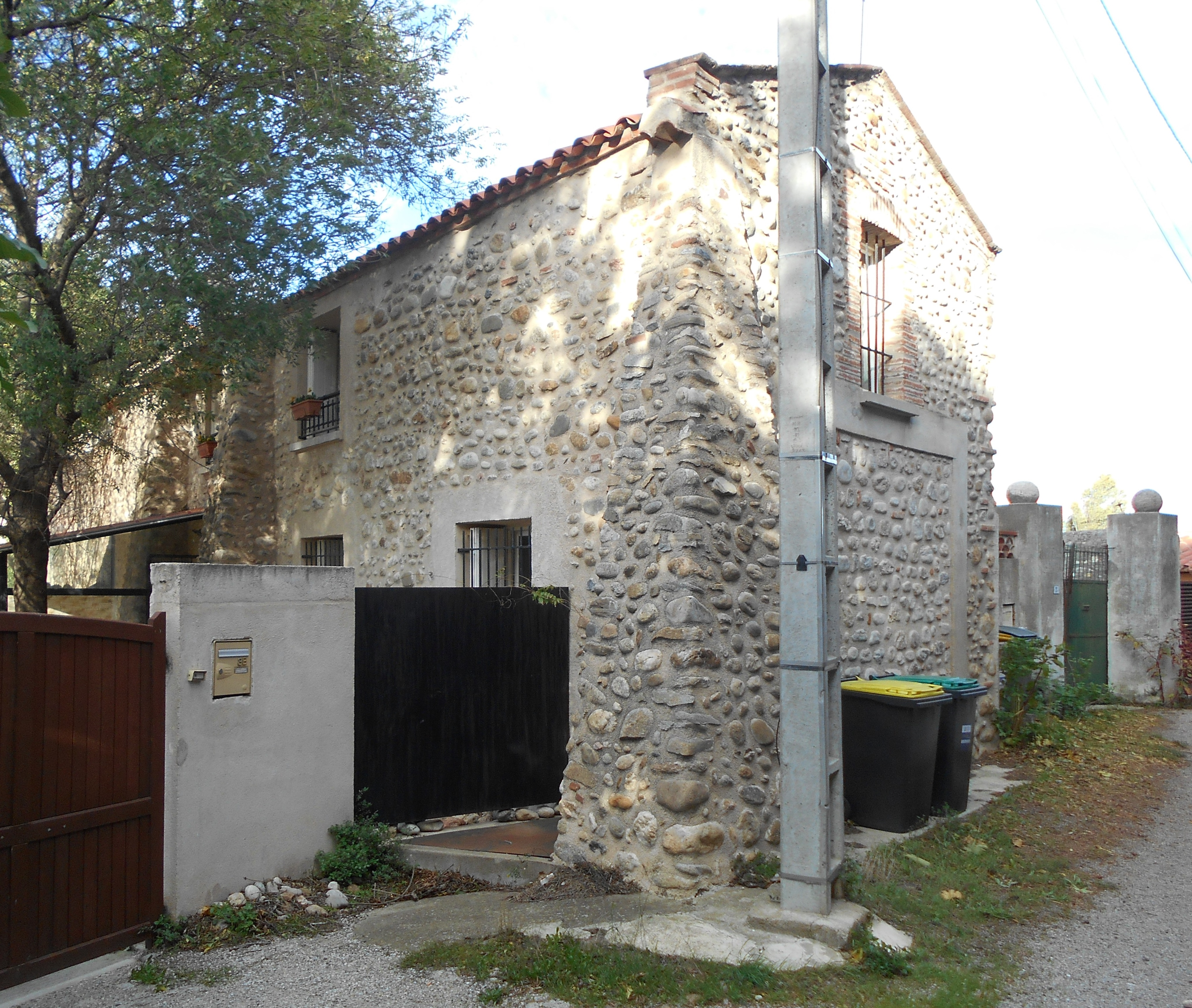 Sant Martí de la Riva